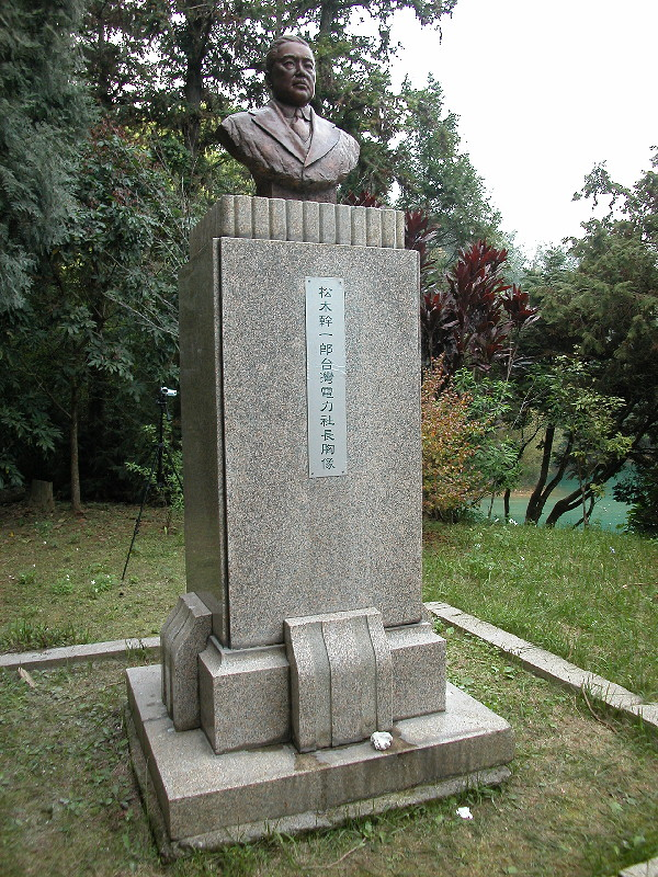 日月潭的松木幹一郎胸像。